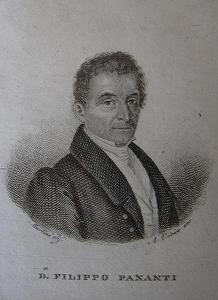 Filippo Pananti.